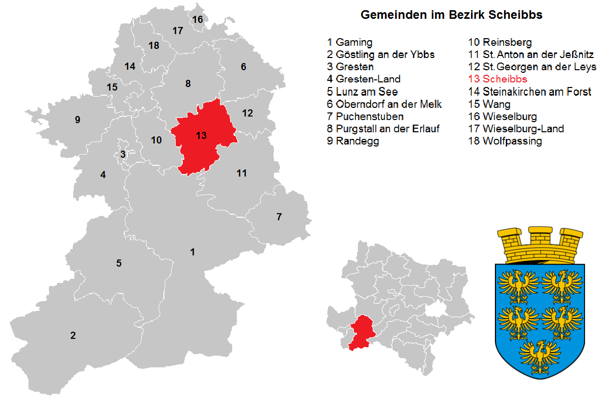 Bezirk Scheibbs